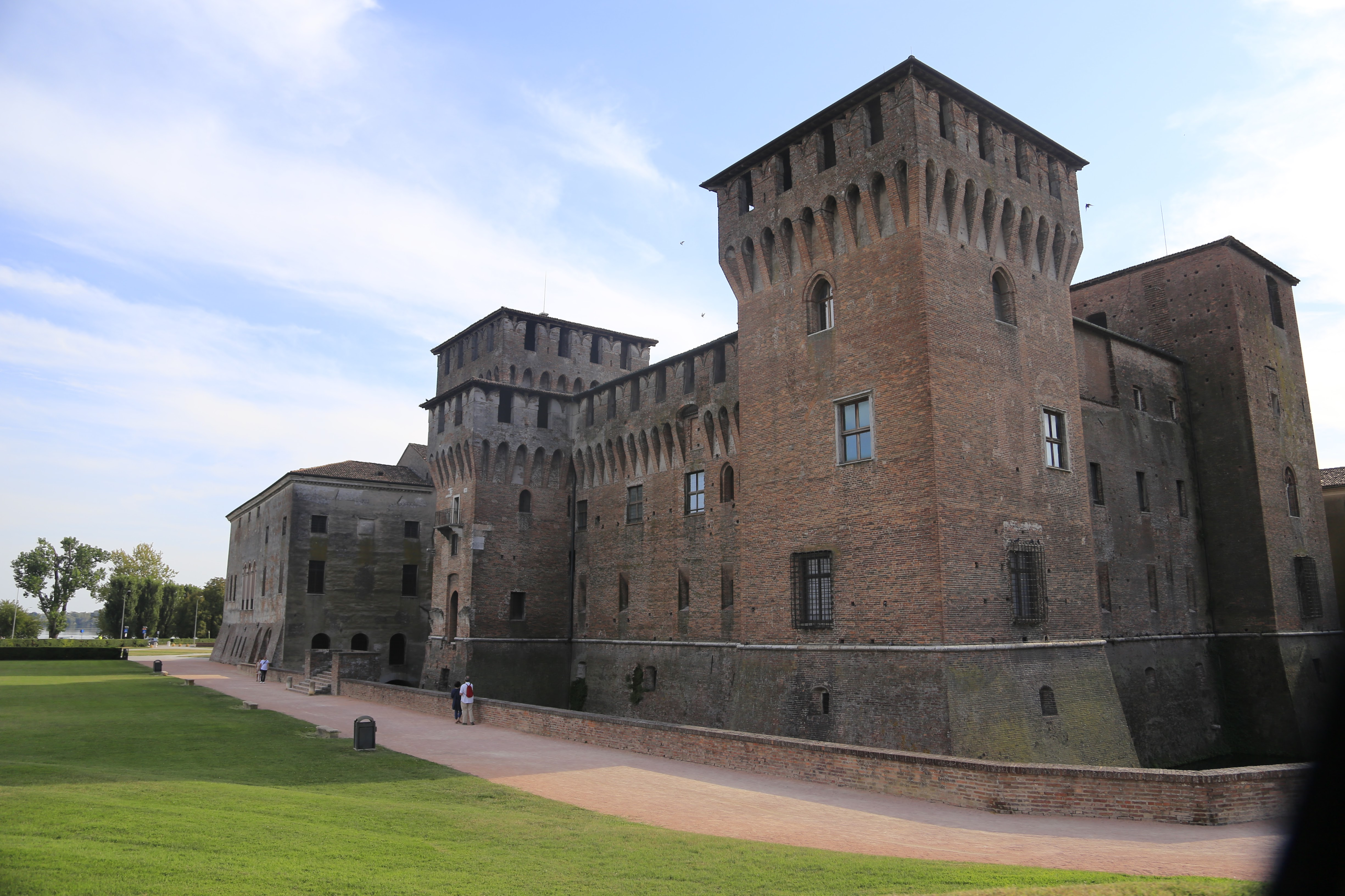 castello di San Giorgio